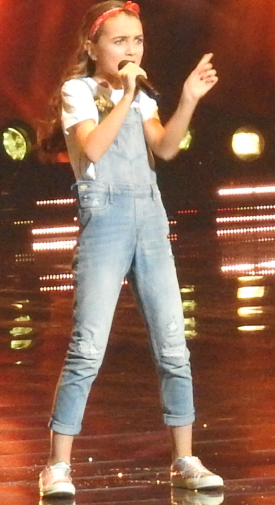 Francuska piosenkarka Angelina Nava podczas prób do występu w 16. Konkursie Piosenki Eurowizji w Mińsku, 24 listopada 2018.